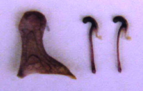 Части цветка: шлем и нектарник борца буйбинского (Aconitum × bujbense). Западный Саян, природный парк "Ергаки".